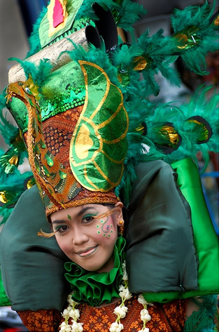 foto ini saya ambil sewaktu di solo ada acara festival solo batik karnival dan juga sekaligus acara lomba nih..... lumayan juga sih pengunjung karnival pada saat itu banyak sekali.... ini hasilnya hunting bersama teman, cuma berdua aja nih.... hahahahahaha.........